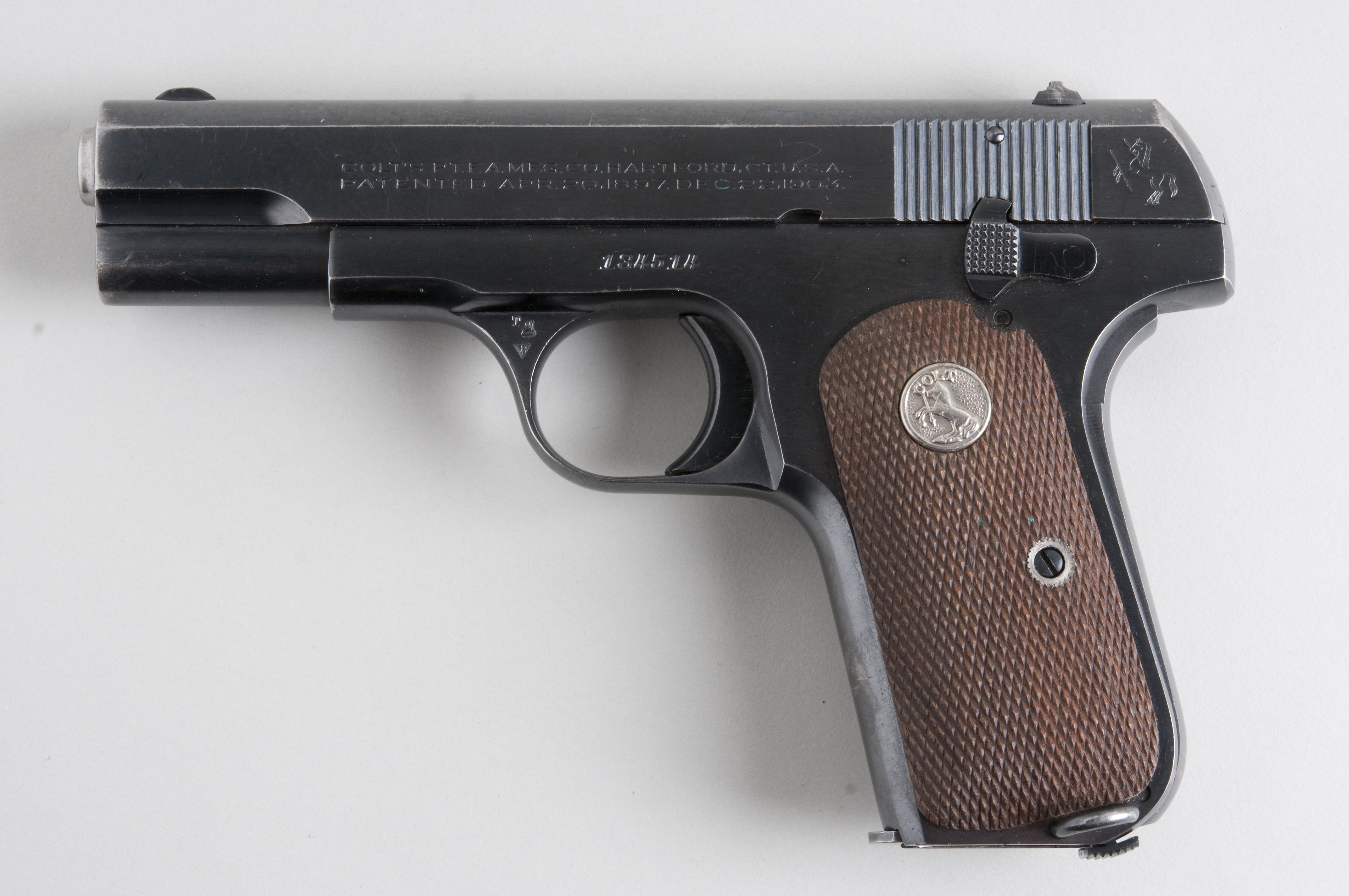 Colt 1908 From flickr user handvapensamlingen - Pistols used in Norway.